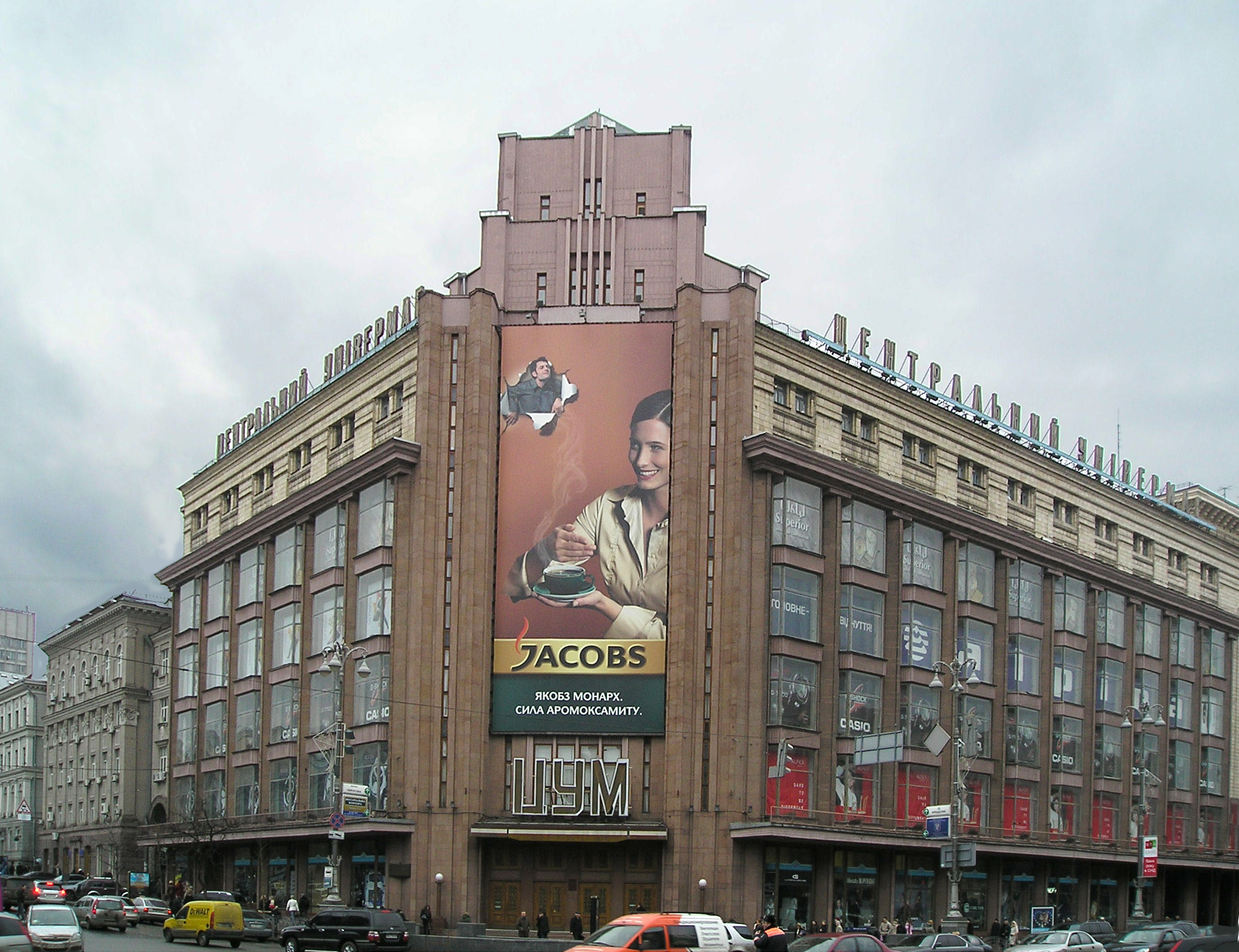 Україна-Київ-Хрещатик-Цетральний Універмаг міста.